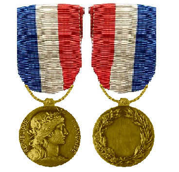 Médaille d’honneur des Affaires étrangères en Bronze France